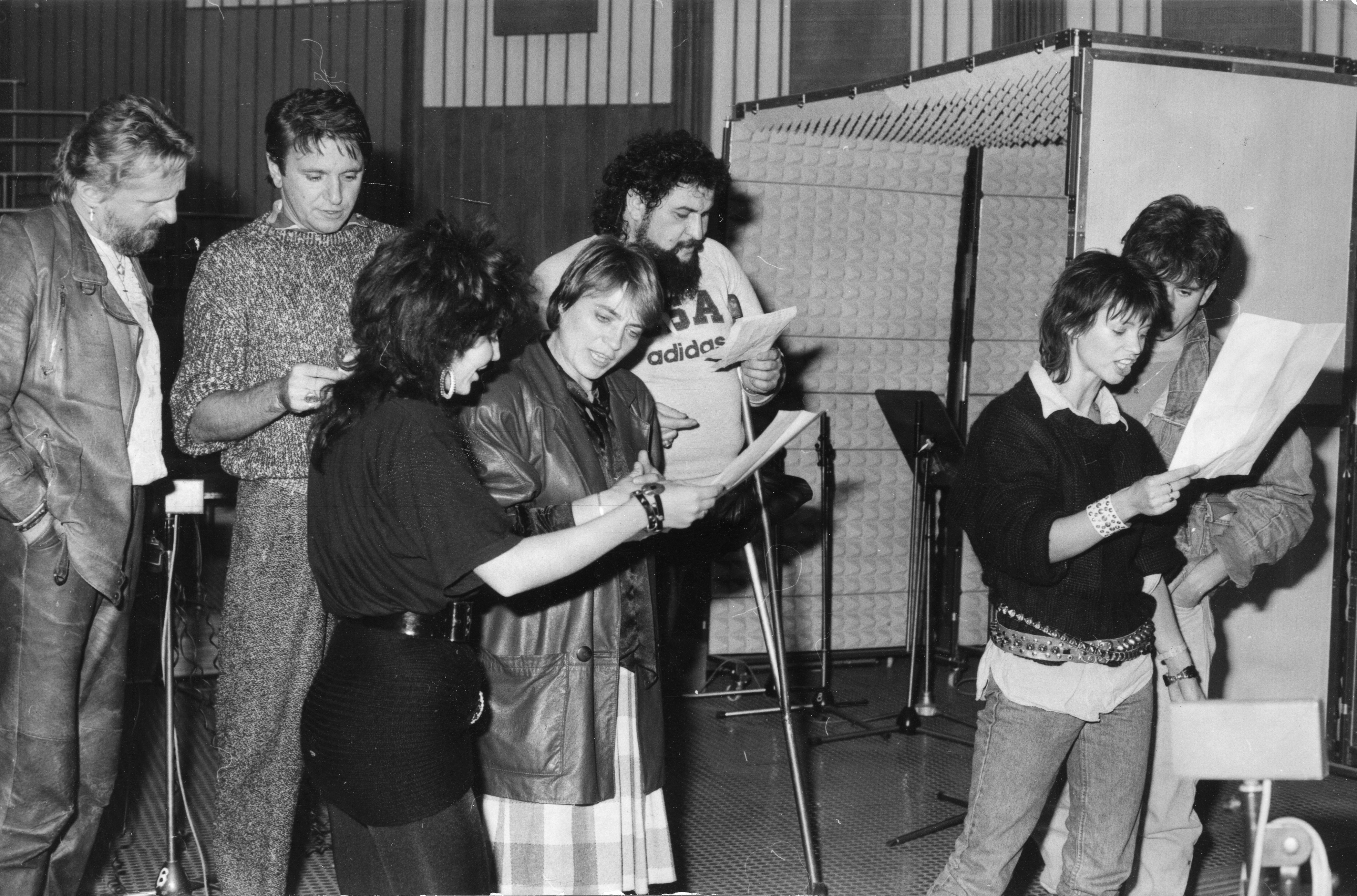 Előkészület a Sportsegély gálaestre 1986-ban: Benkő László, Komár László, Kiss Gabriella szerkesztő, Kovács Kati, Deák Bill Gyula, Görbe Nóra, Kiki (Első emelet)